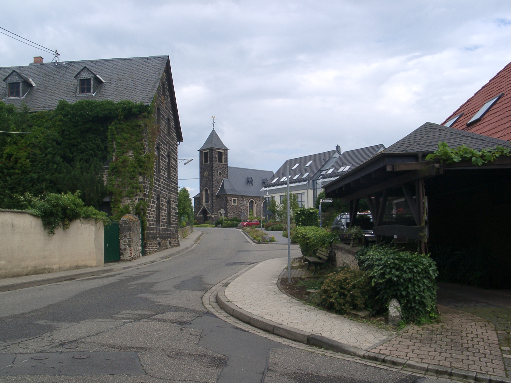 Hauptstraße Wolken (MYK)